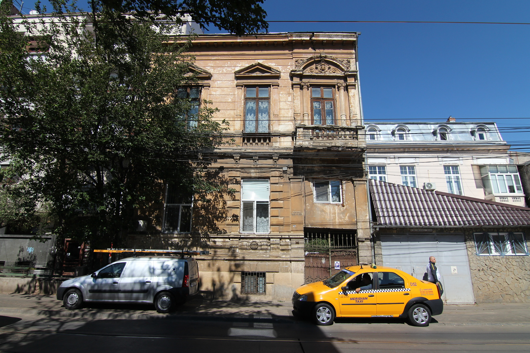 Casă pe Calea Călărașilor